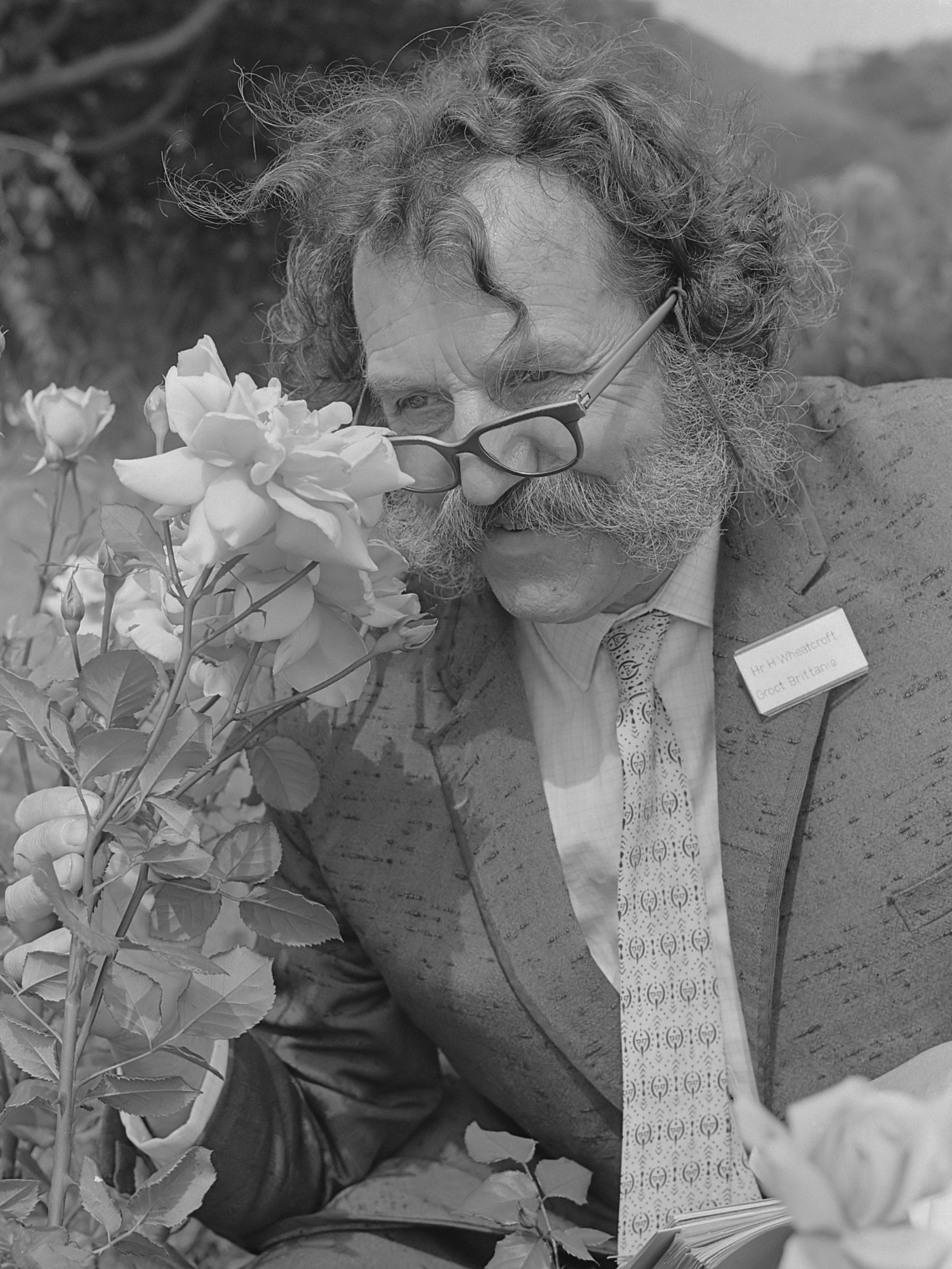 Internationaal Rozenconcours in Den Haag . Jurylid Harry Wheatcroft aan het werk 15 juli 1963